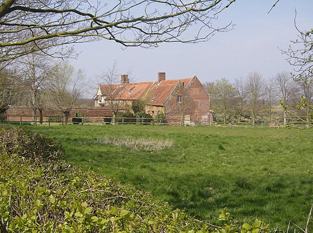 Hales Hall